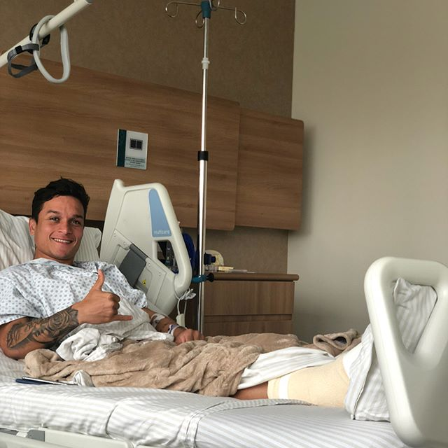 artur Artur Victor Guimarães